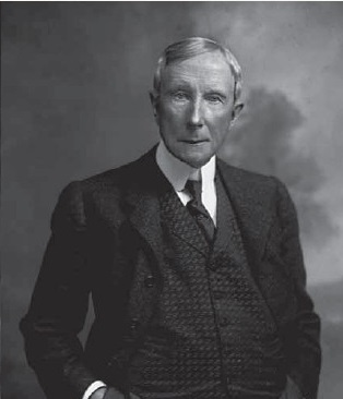 Retrato de John D Rockefeller de Oscar White